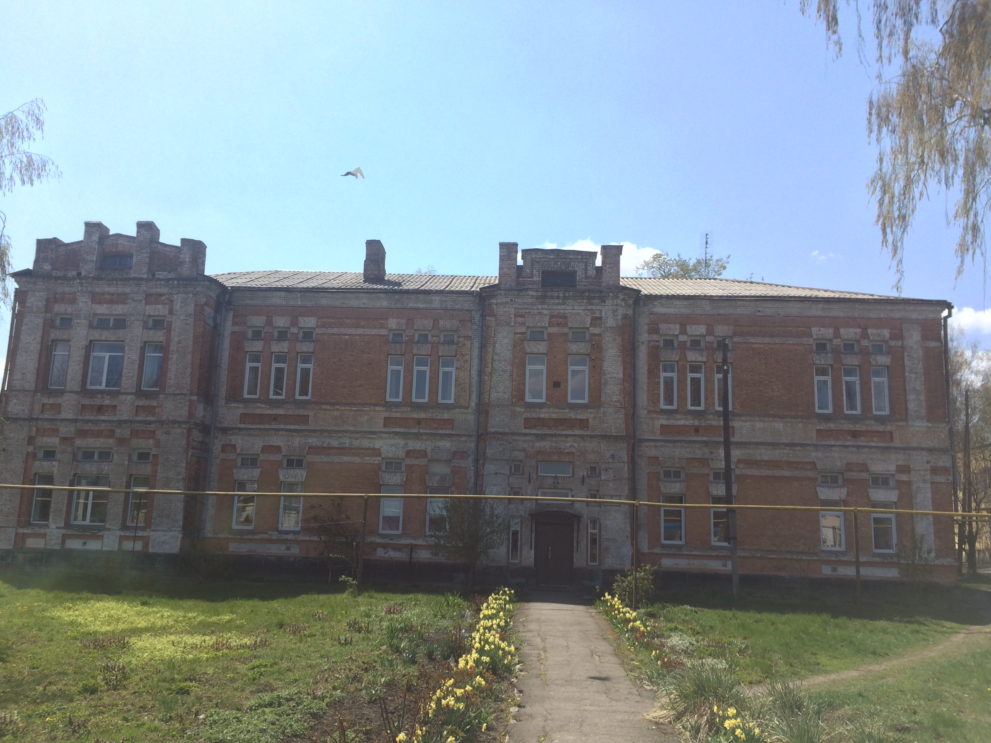 Кондукторский резерв, бывшее железнодорожное двухкласное училище.